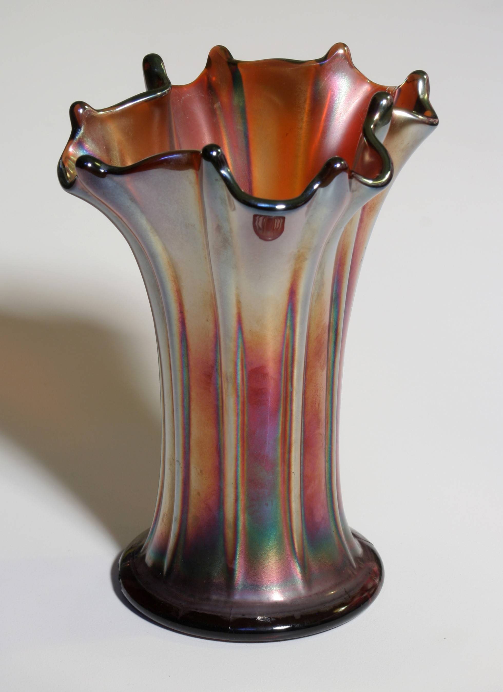 A carnival glass vase.